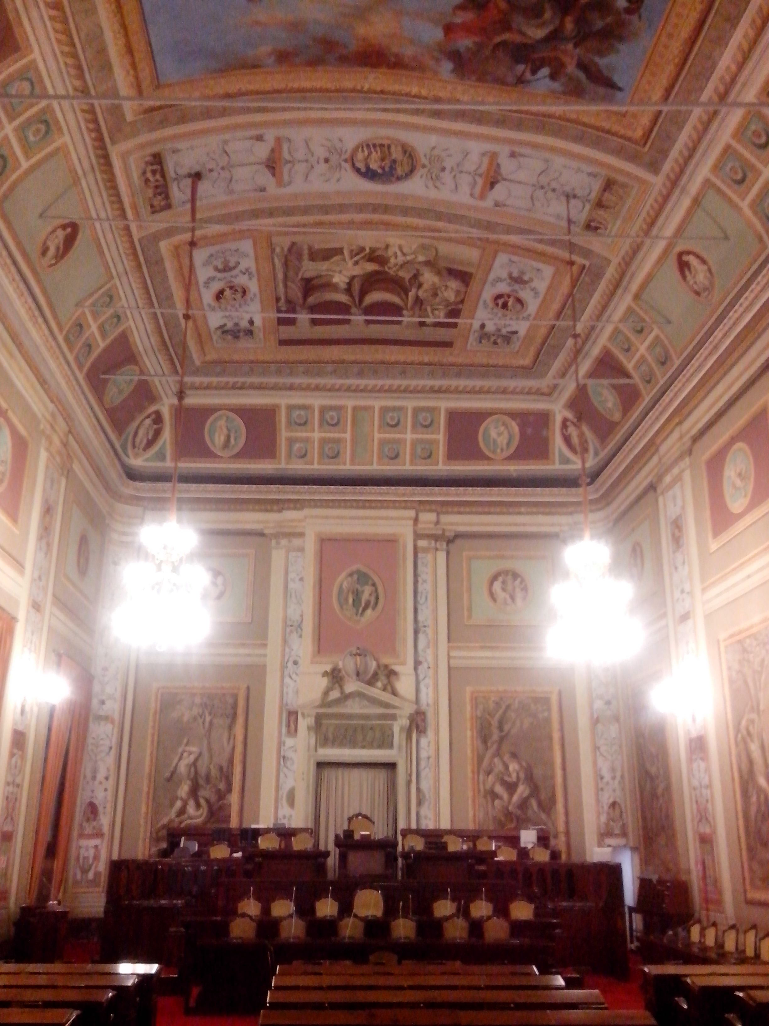 Sala d'Ercole, aula parlamentare dell'Assemblea regionale siciliana, dopo i restauri. Affreschi di Giuseppe Velasco